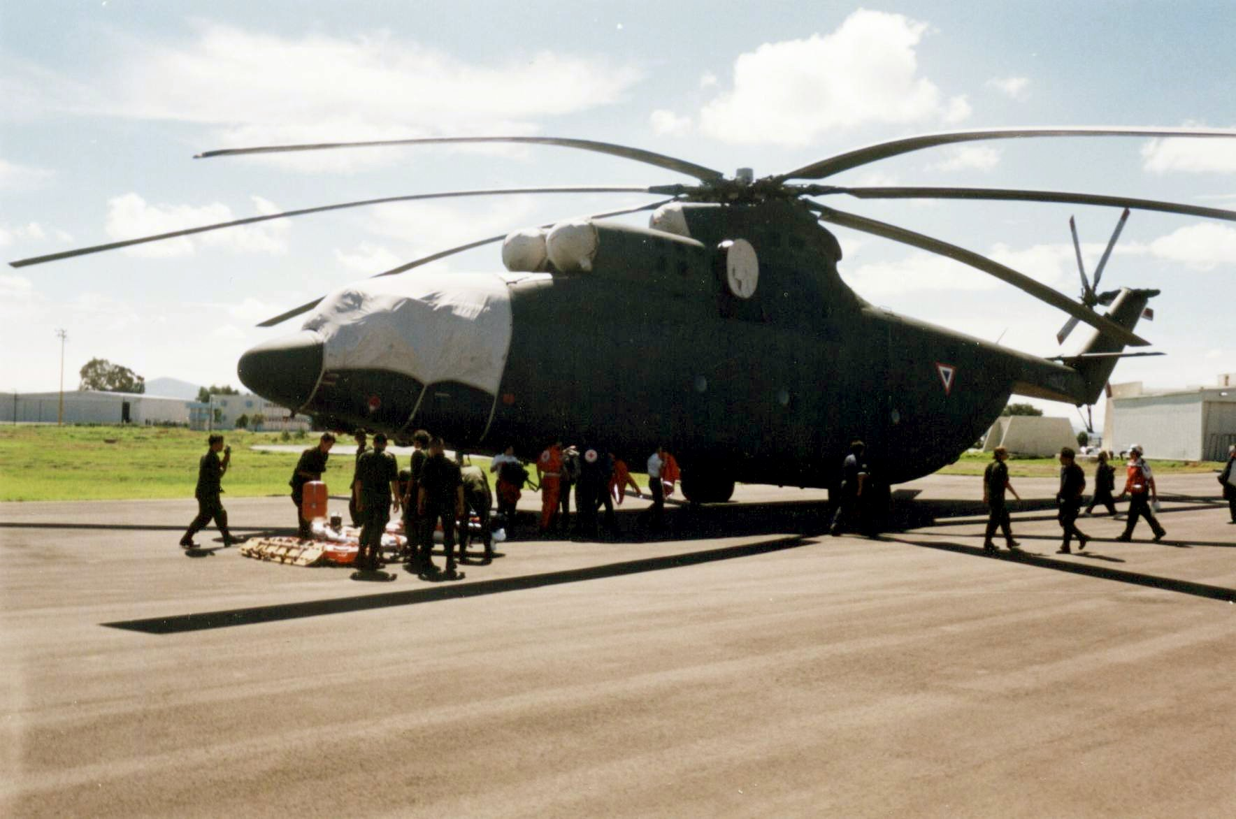 Helicóptero MI-26 en la Base Aérea Militar No. 1 en Santa Lucía, Estado de México, México.